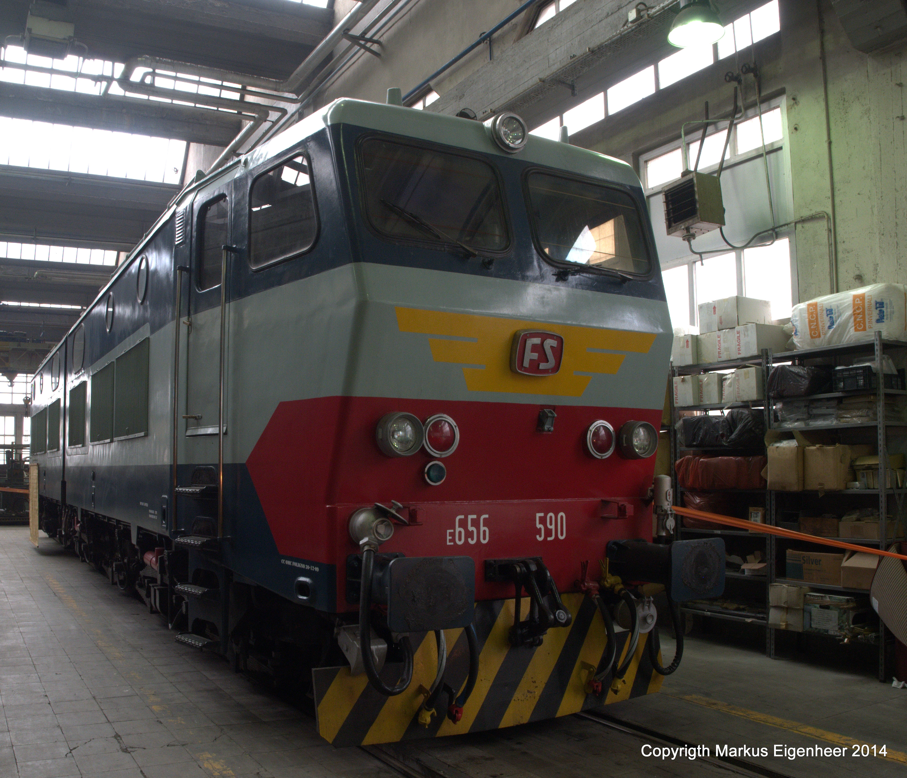 Milano Rialzo 22.03.2014